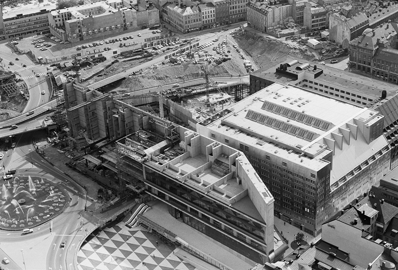 Norrmalm, Kulturhuset, Sergels Torg, Brunkebergstorg, Hamngatan, Hötorgsskraporna. Rivningar. City. Motiv: Stockholms innerstad Nyckelord: Flygbilder, Riksintressen Kategori: Stadsmiljö Norrmalm, Kulturhuset, Sergels Torg, Brunkebergstorg, Hamngatan, Hötorgsskraporna. Rivningar. City.